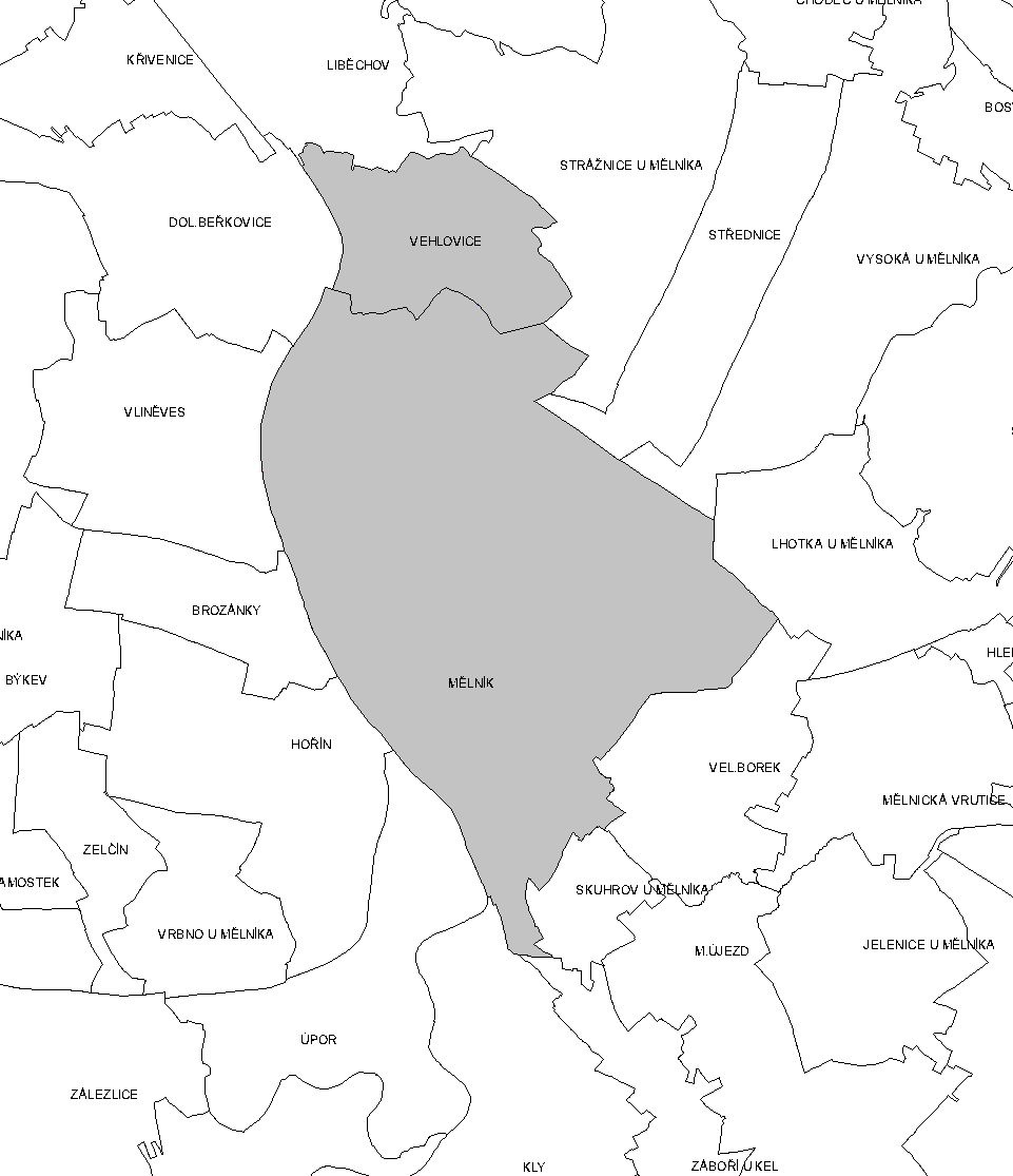 Katastrální území Mělníku